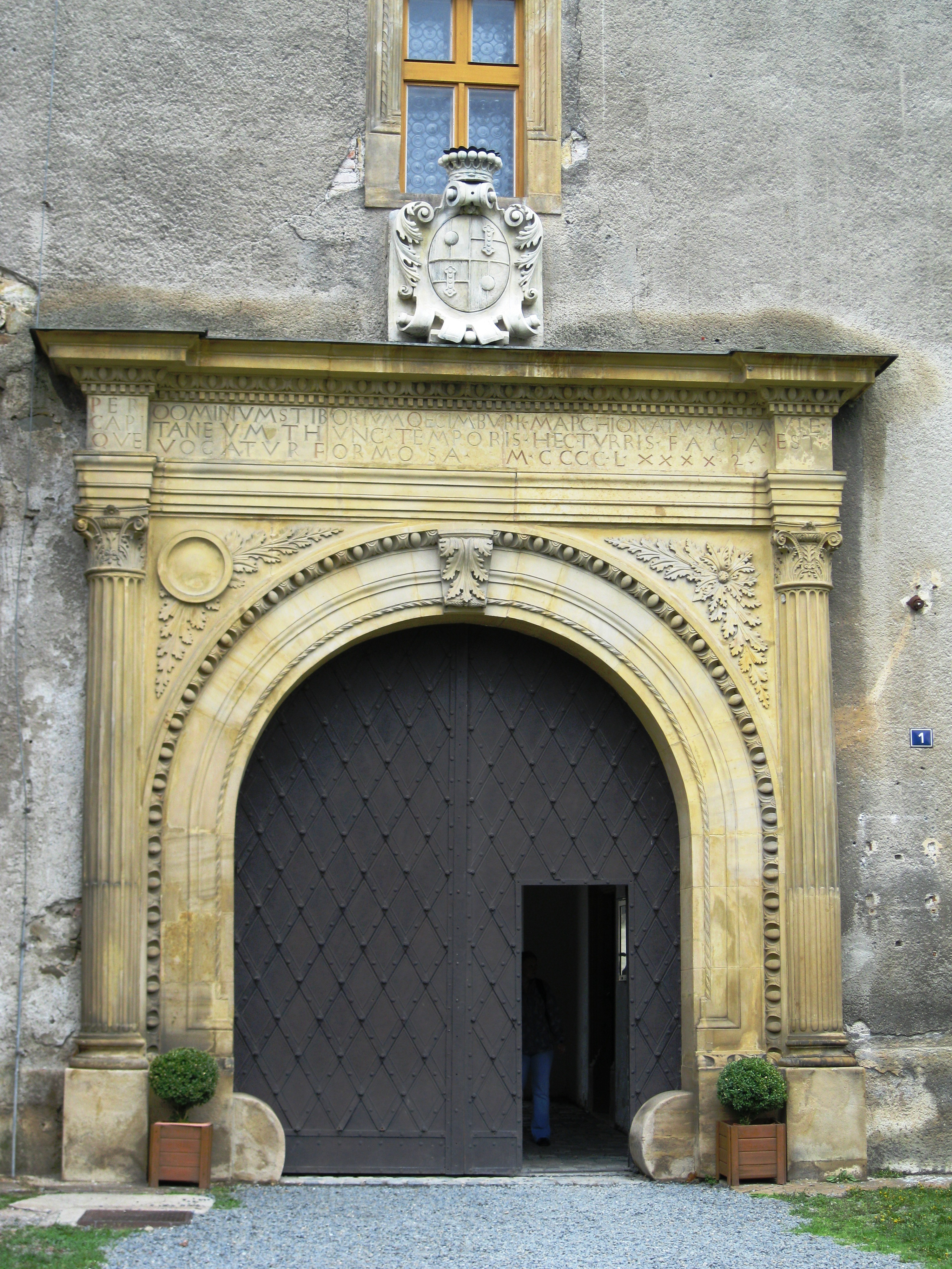 Zámek Tovačov, Tovačov 1